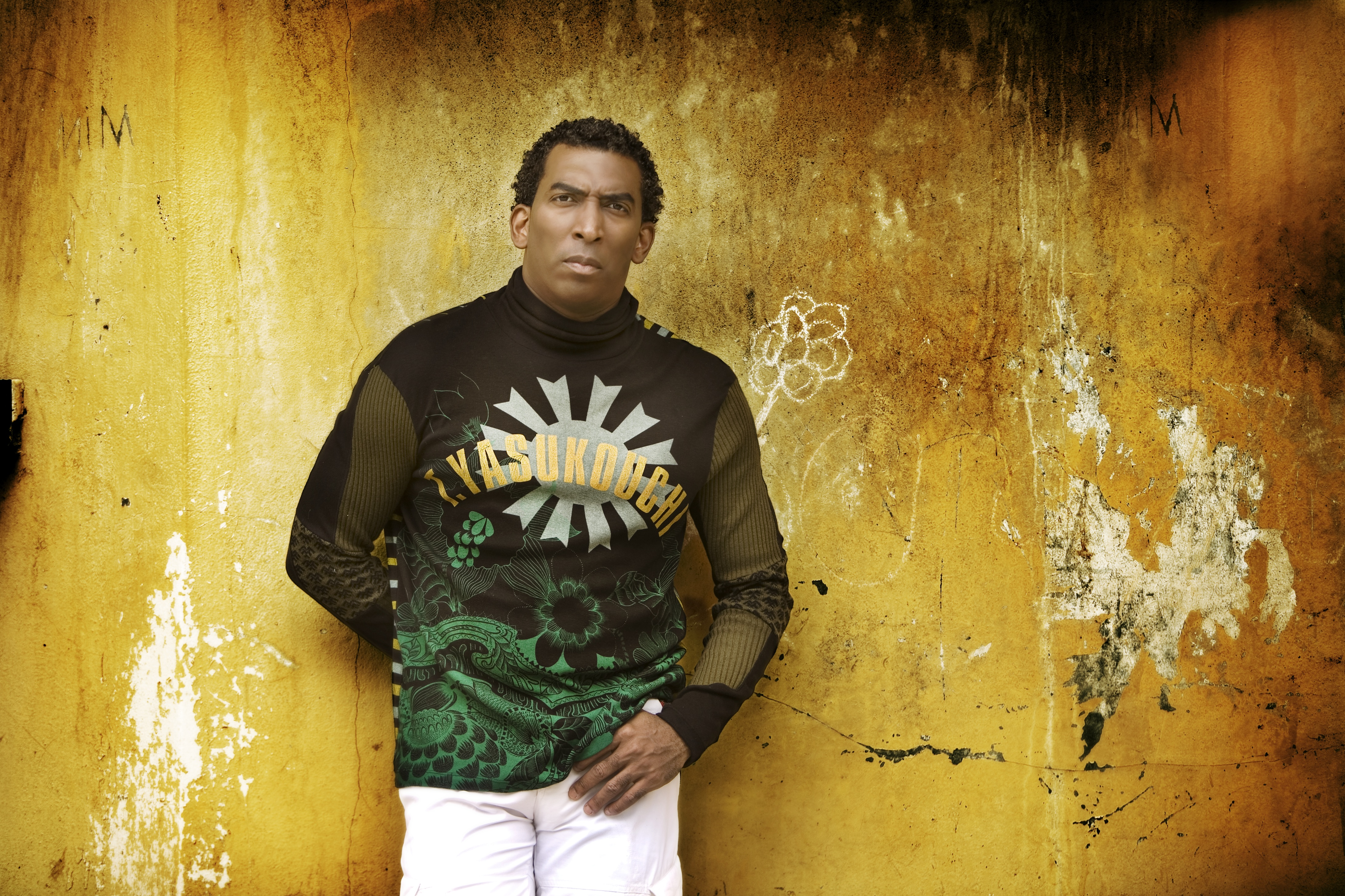 FOTO DE CHICHI PERALTA , DE PROMOCION